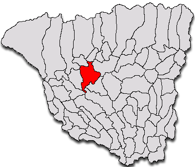 Categorie:Hărţi ale judeţului Gorj